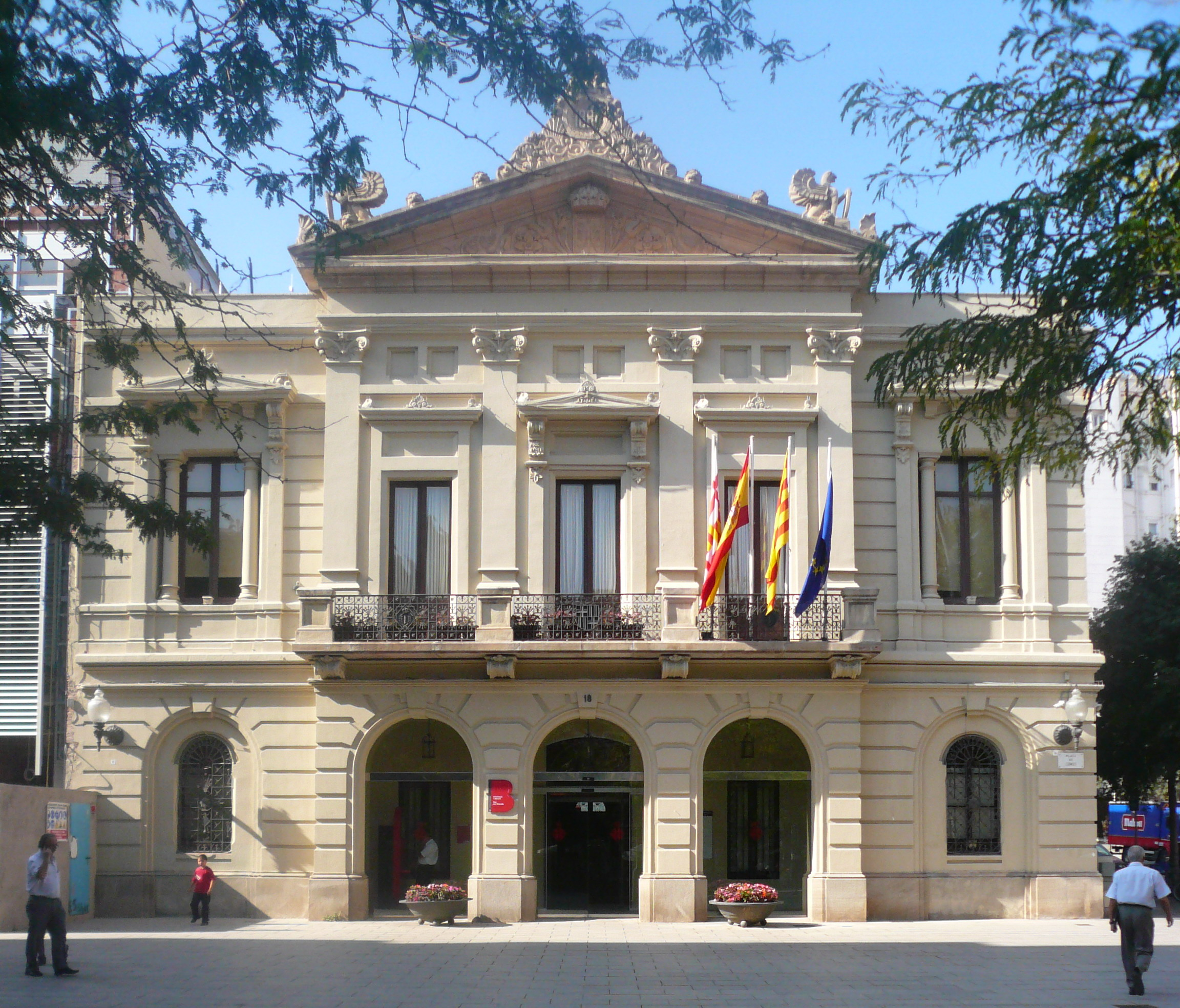 Casa Consistorial (Barcelona)